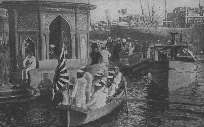 arrivée d'un contre torpilleur japonais en rade de Salonique.